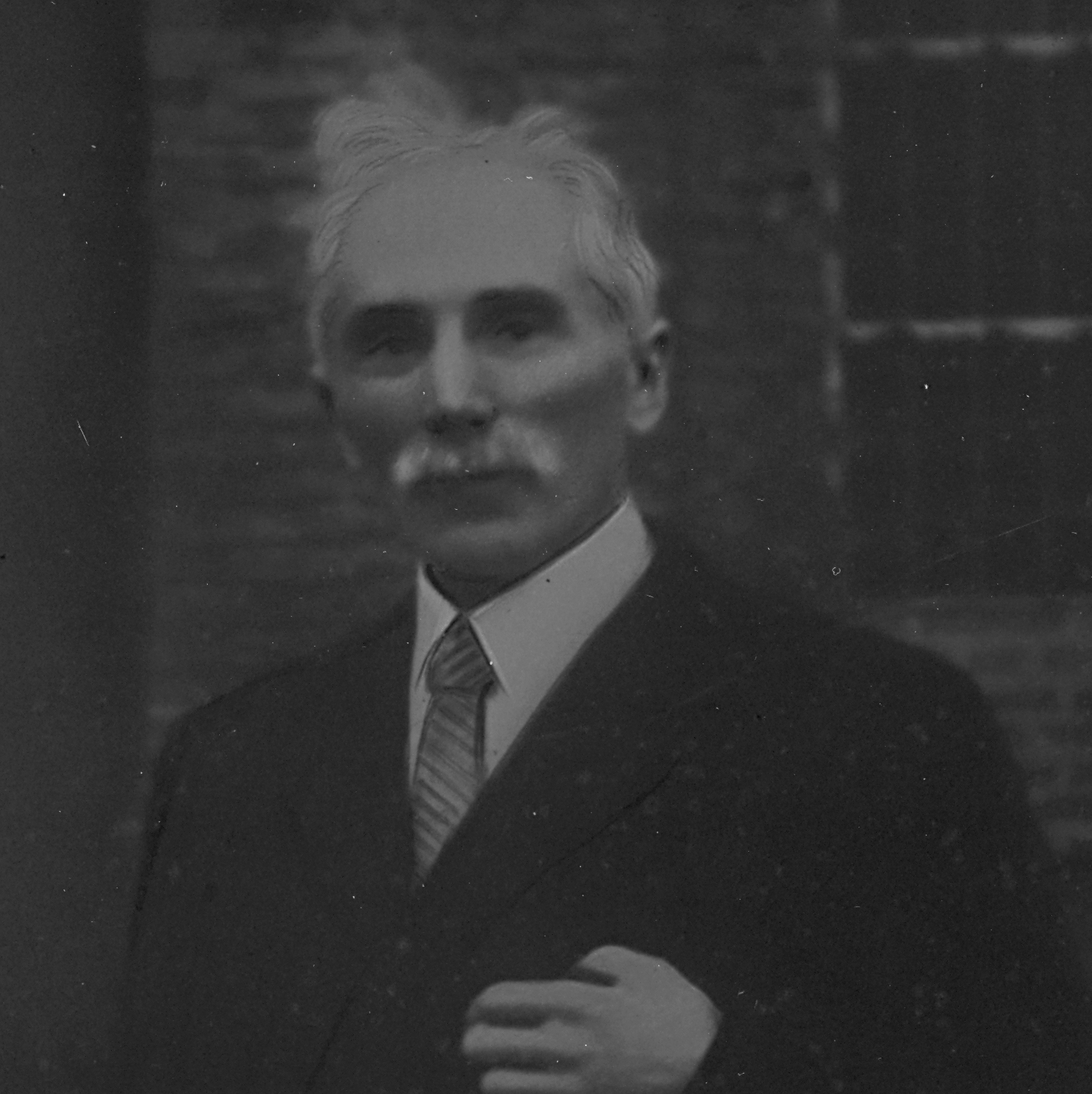 René August Nuttin werd geboren in Kooigem in 1871. Hij is de geestesvader van de populaire Vlaamse scheurkalender De Druivelaar.